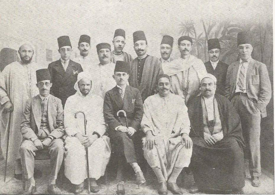 يبدو جلوسا على اليمين: الشيخ سليمان الجادوي صاحب المرشد ومرشد الأمة وعمر بن قفصية وأحمد توفيق المدني والشيخ المكرّم وحسين الجزيري، الصف الأول وقوفا على اليمين: أحمد بنيس والطيب بن عيسى ومحمد بن عمر ومحيي الدين القليبي والشعر الأمير محمد الشاذلي خزندار والشيخ محمد الثميني صاحب مكتبة الاستقامة، الصف الثاني وقوفا على اليمين: البشير الفورتي والبشير الخنقي وحمودة الخماسي.